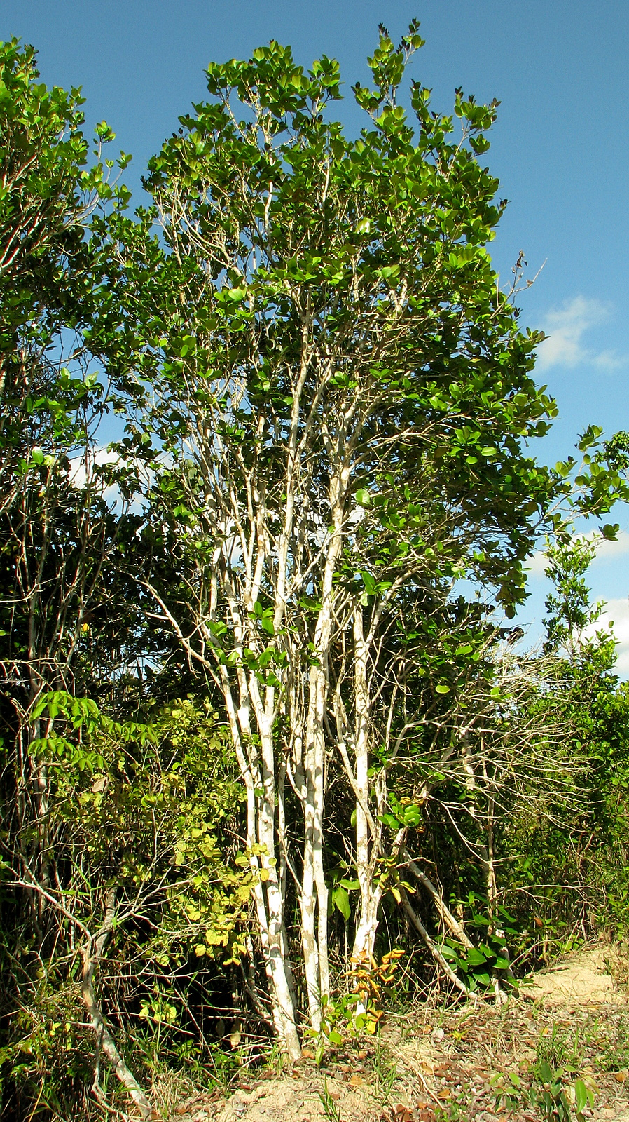 Eugenia ilhensis O.Berg